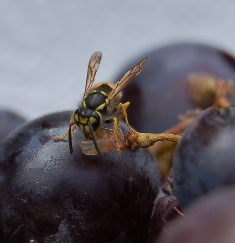 Guêpe mange raisin - Wasp eating grape - Vespula vulgaris